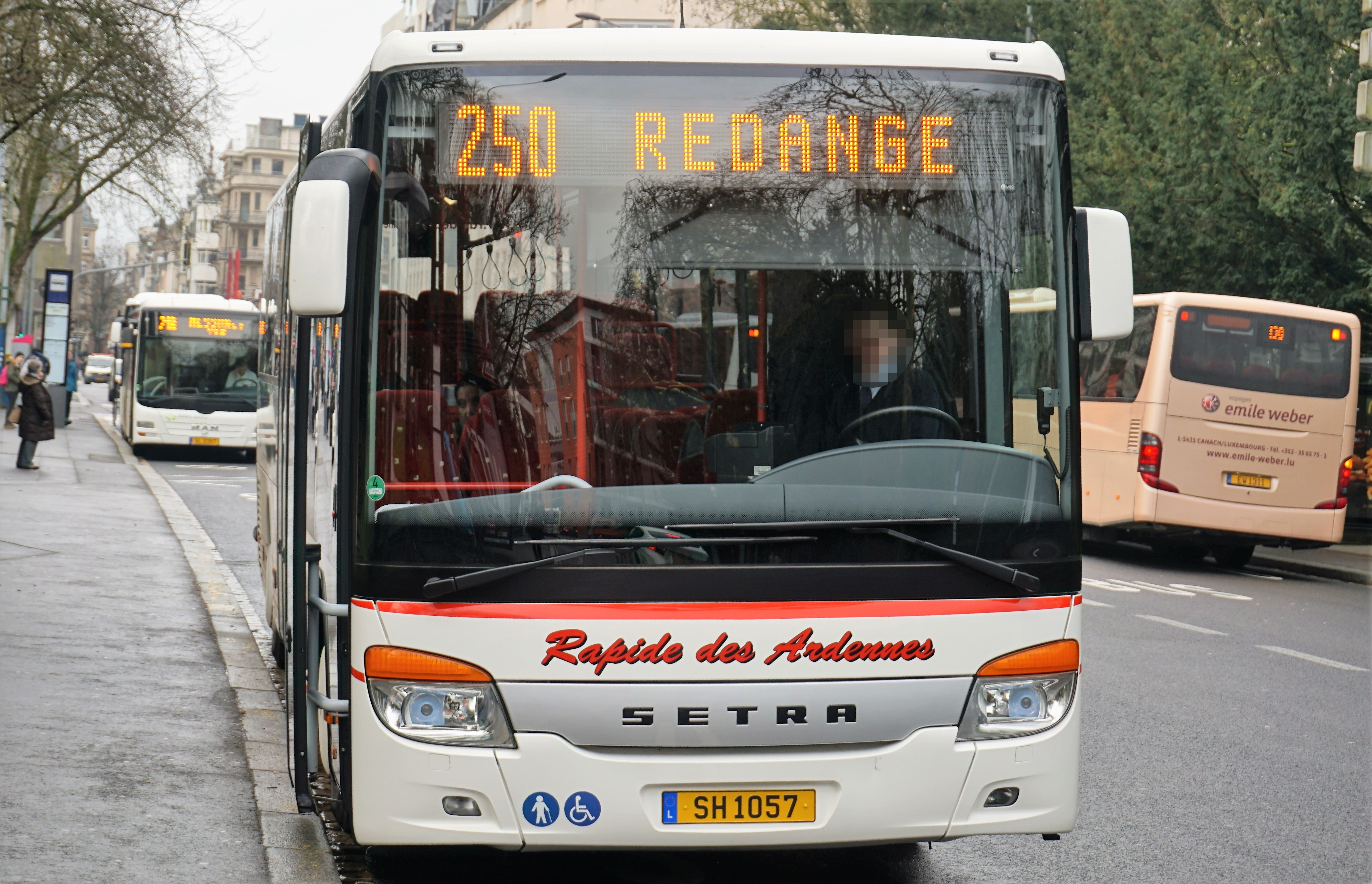 Luxembourg, avenue Emile-Reuter arrêt Charlys Gare, SH1057, Rapide des Ardennes, ligne 250 direction Redange.